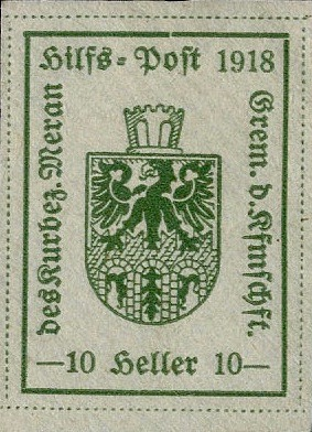 Meraner Hilfspost, Probedruck auf weißem Papier